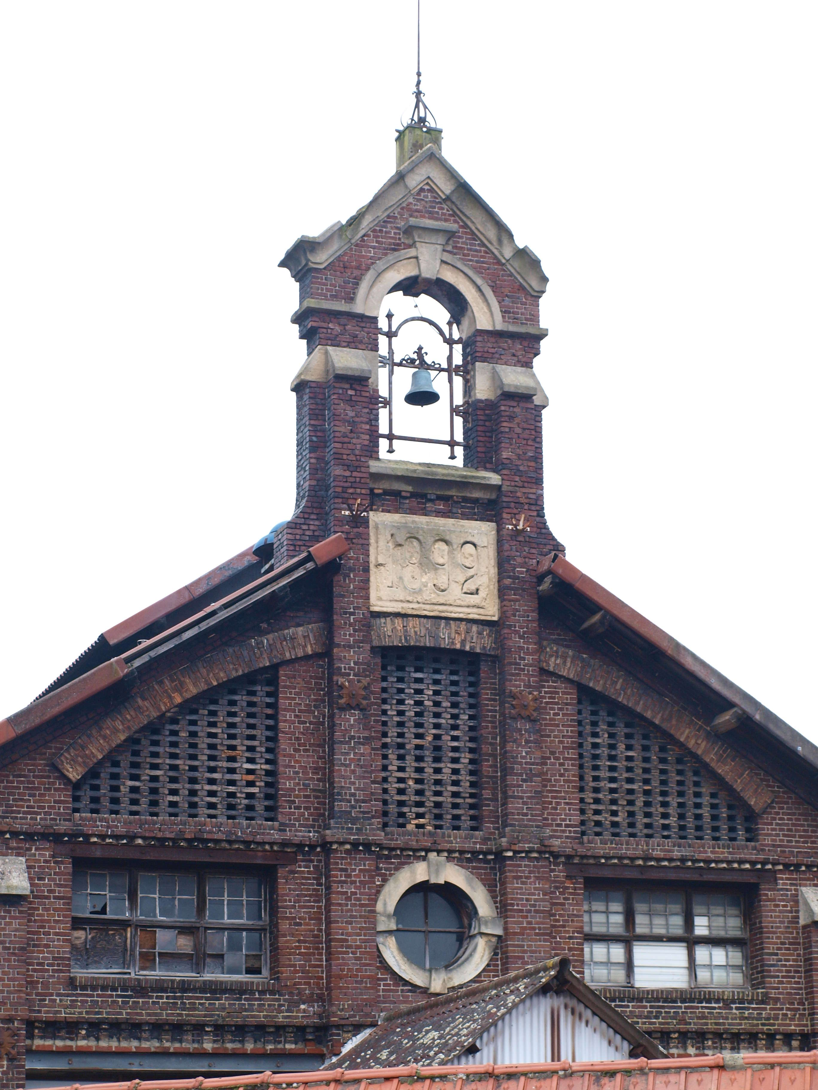 Vieux-Rouen-sur-Bresle ( Seine-Maritime, France) ; verrerie